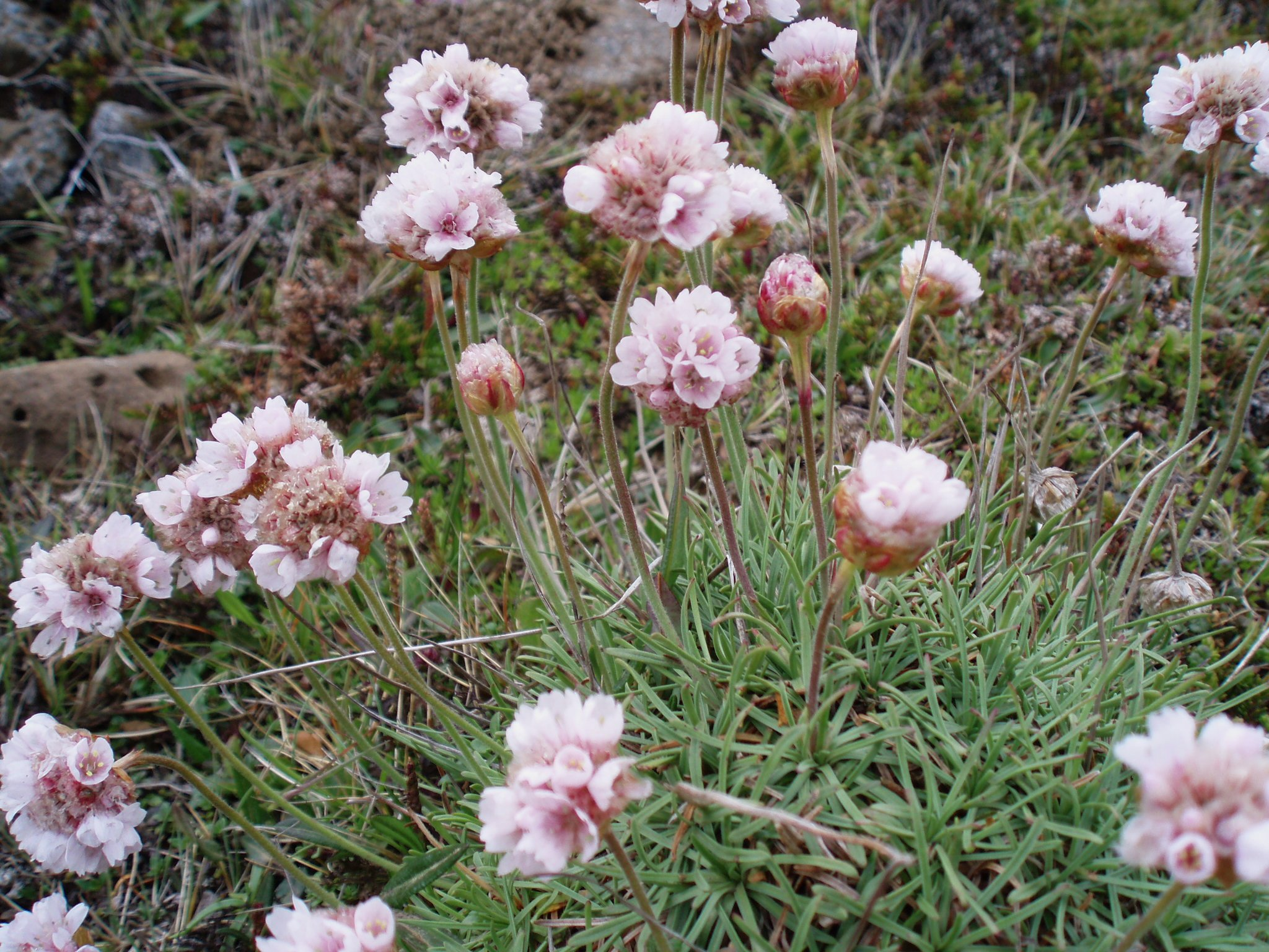 Armeria maritima (Gemeine oder Strand-Grasnelke) in Iceland